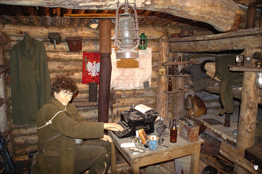 Replika bunkra "Ptasia Wola" Tajnej Organizacji Wojskowej Gryf Pomorski w Centrum Edukacji i Promocji Regionu w Szymbarku